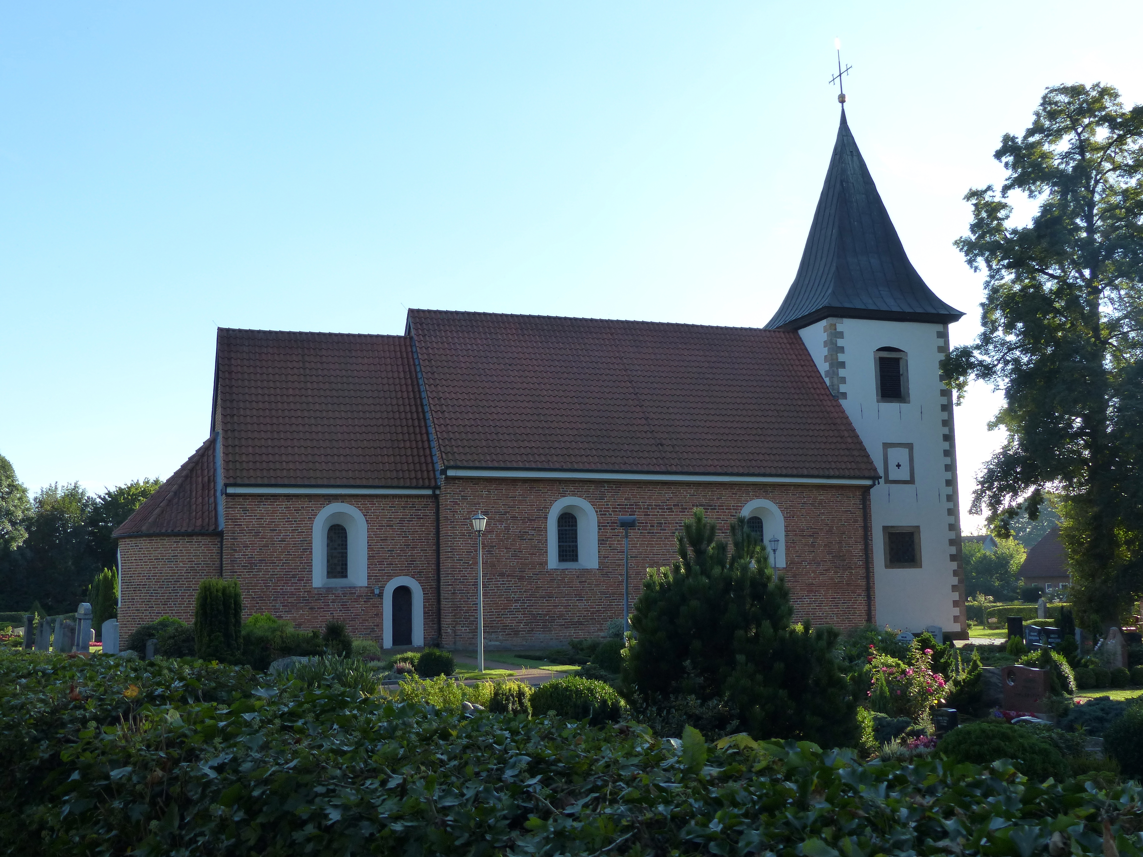 Katharinenkirche in Neuenkirchen bei Bassum von nOrden